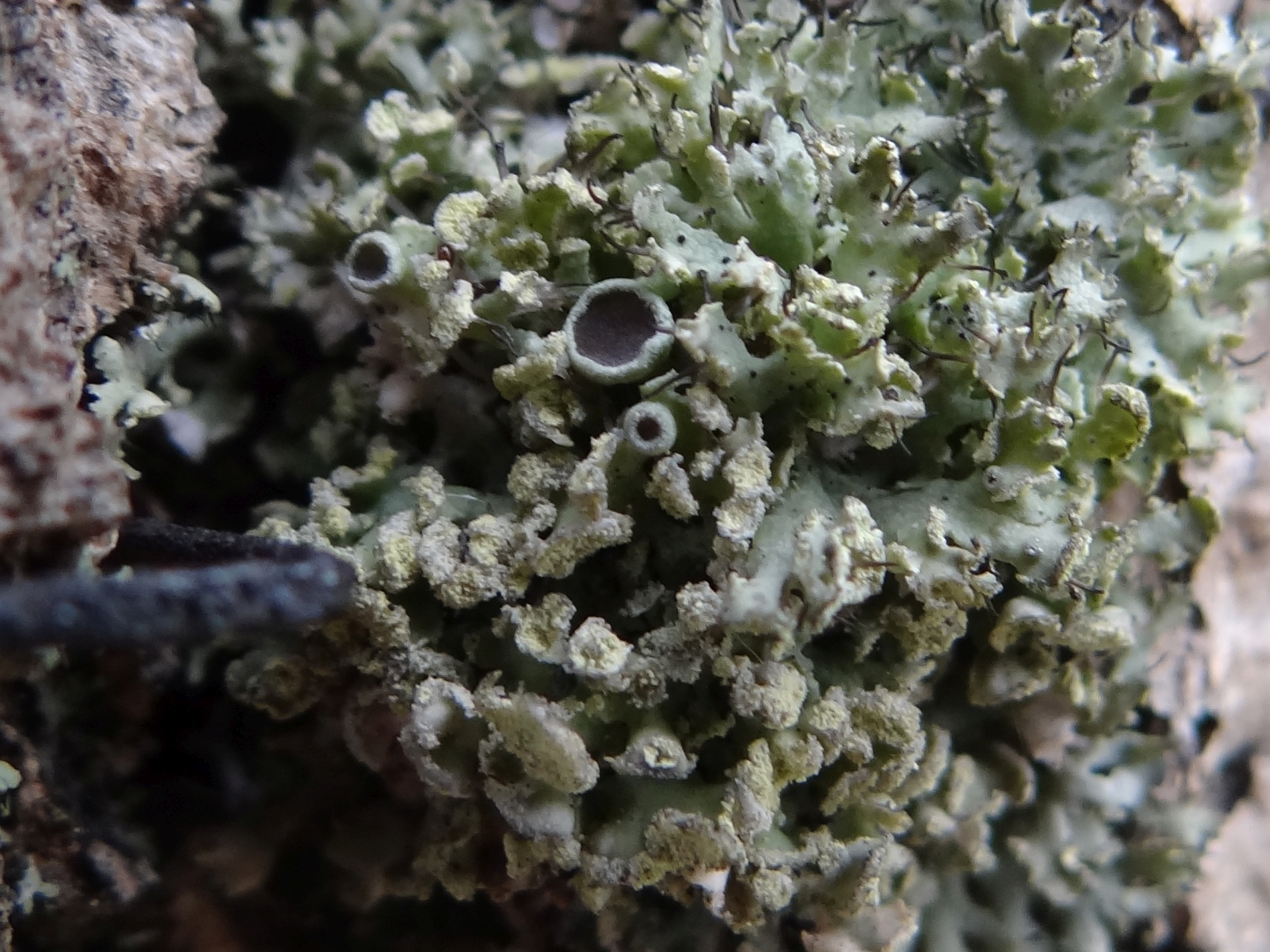 Physcia tenella (location: Poland, Zakliczyn, drzewa przy kościele franciszkanów)